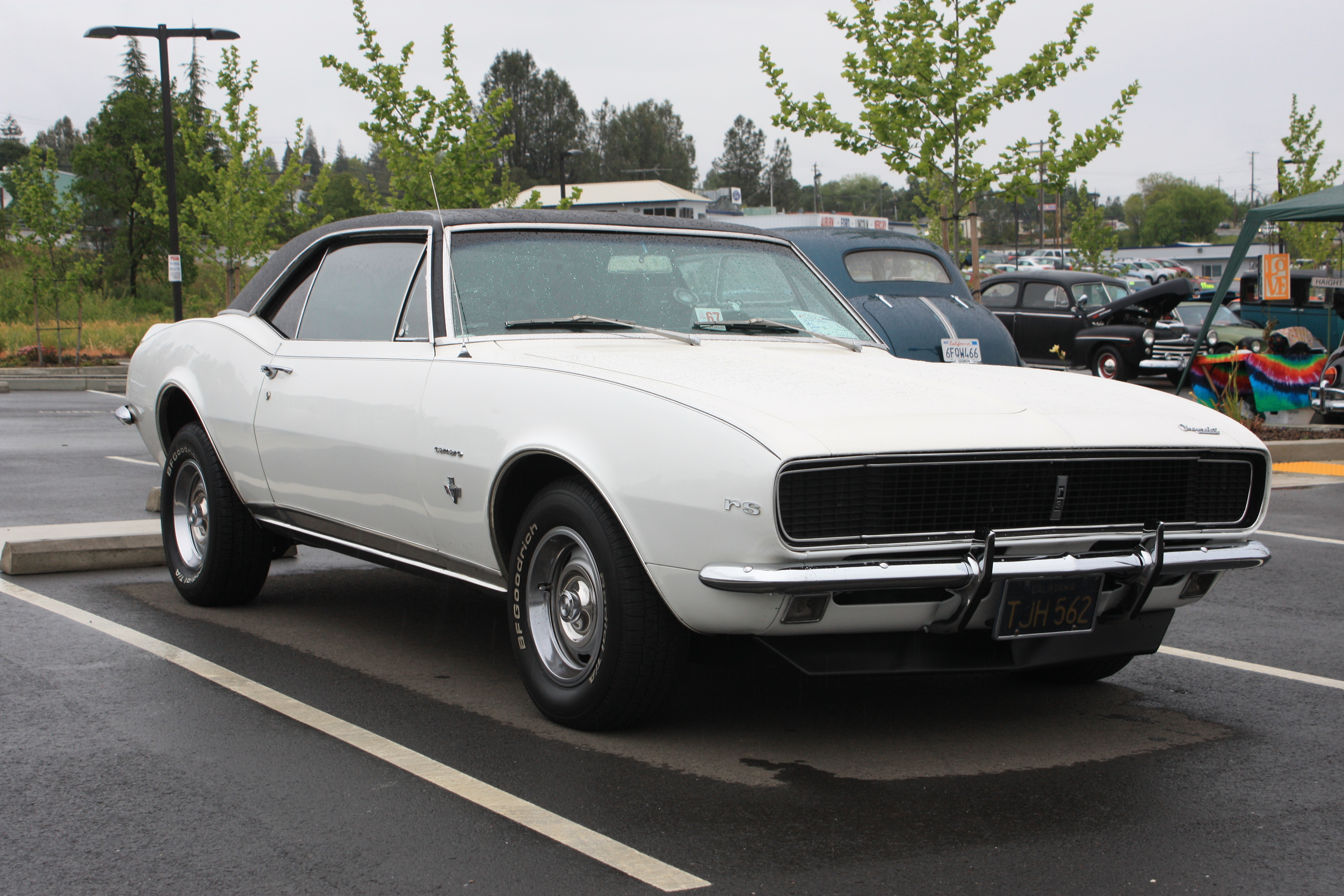 Camaro RS